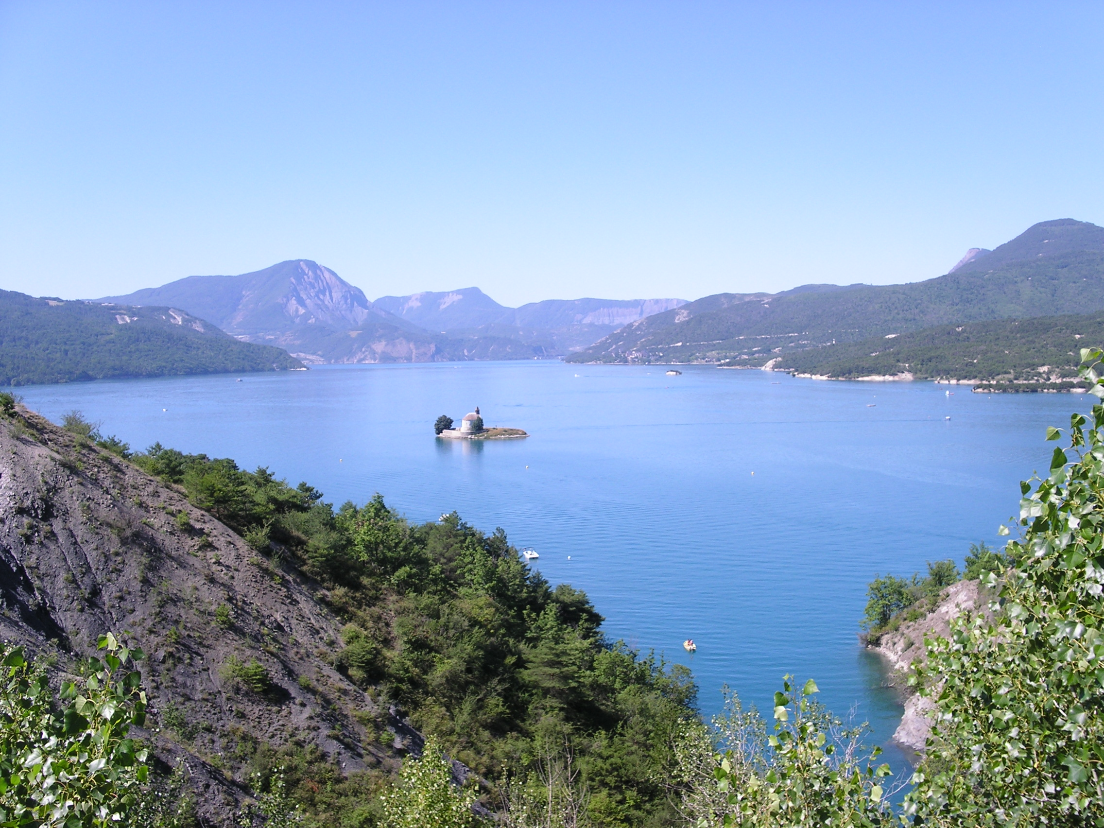 Lac de la Serre-Ponçon